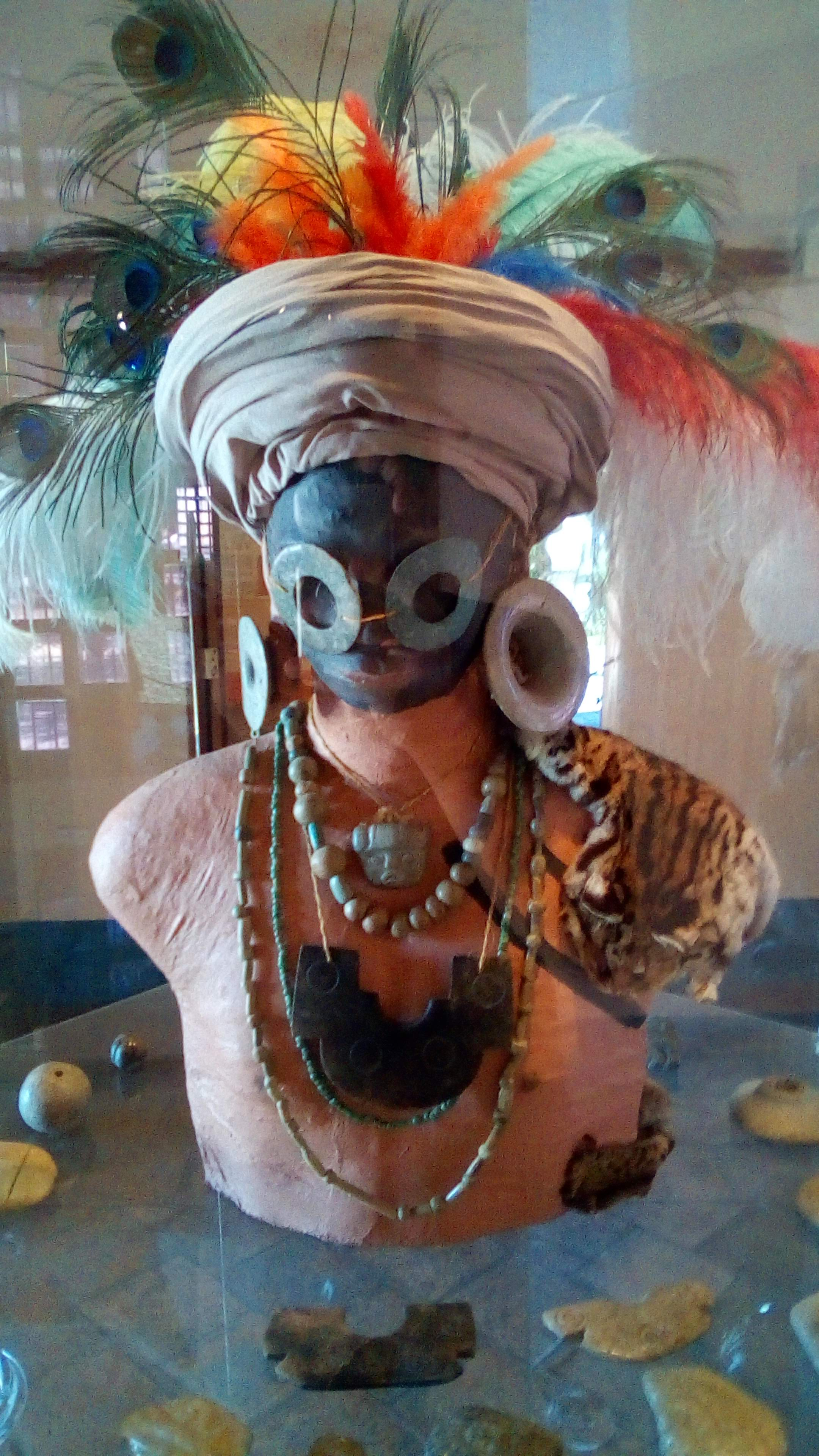 CaciqueLenca